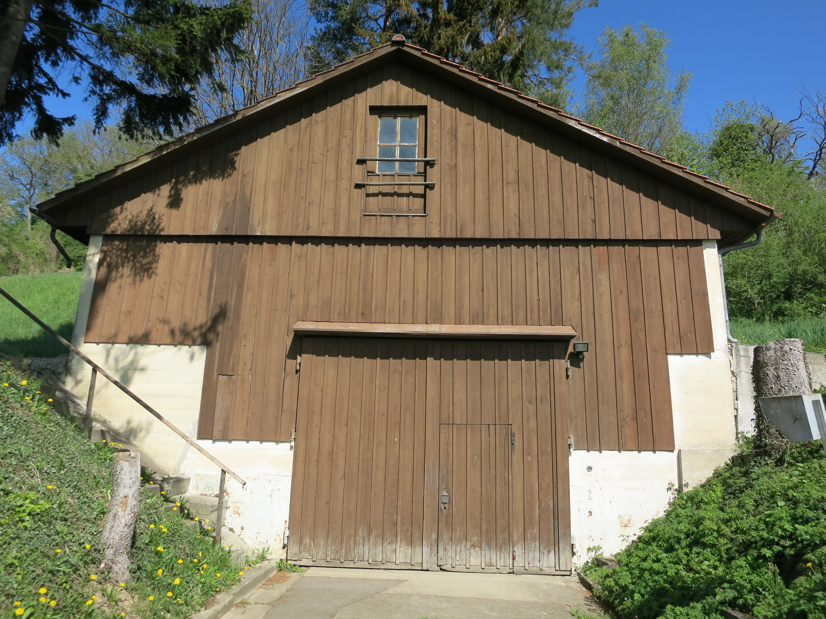 Festung Ebersberg ZH, Schweiz